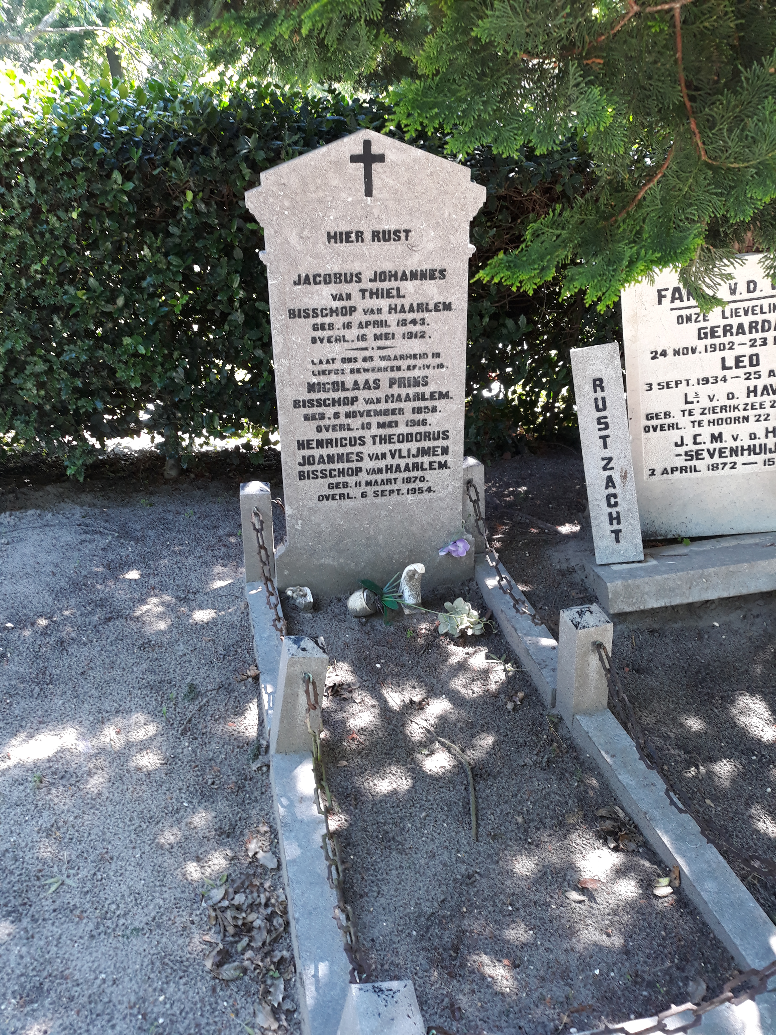 Grablege der altkatholischen Bischöfe von Haarlem auf dem Friedhof Kleverlaan in Haarlem.